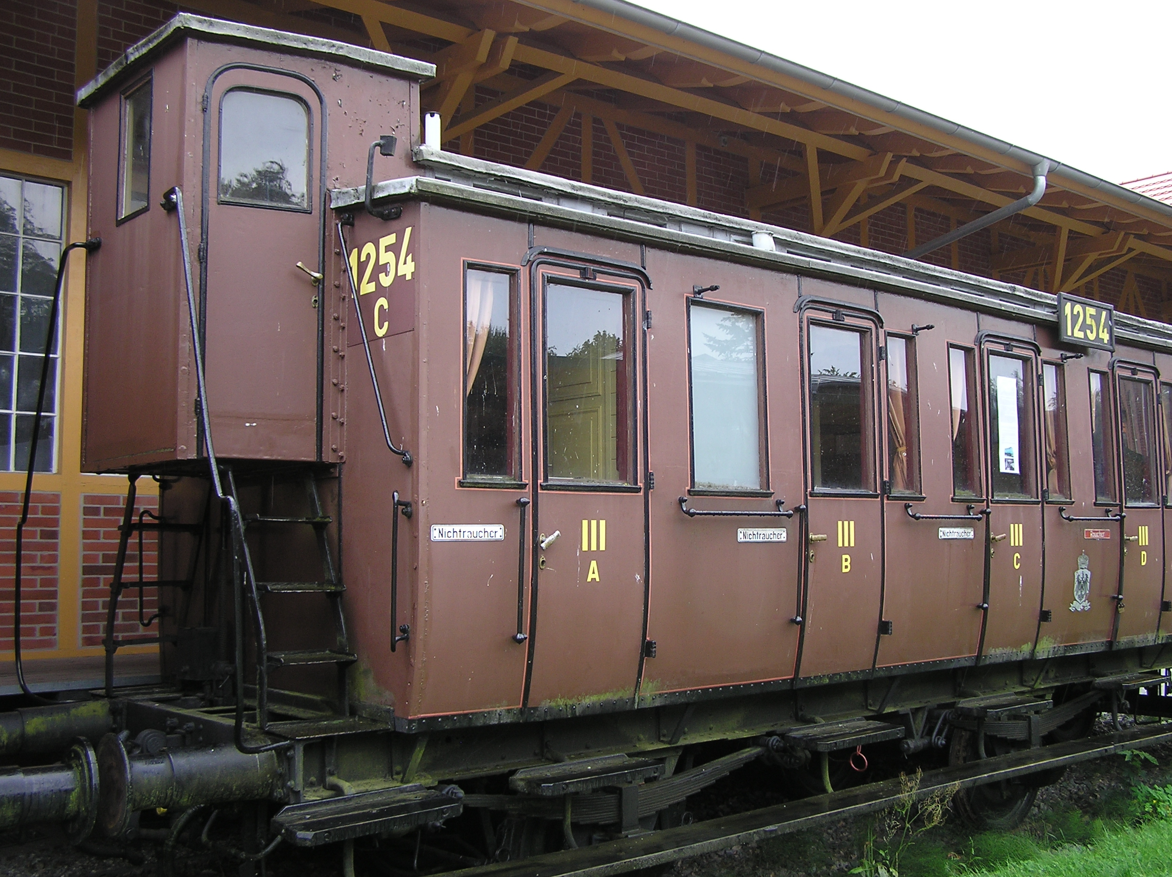 Bremserhäuschen an einem preußischen Abteilwagen C3 im Bahnhof Heringsdorf/Usedom